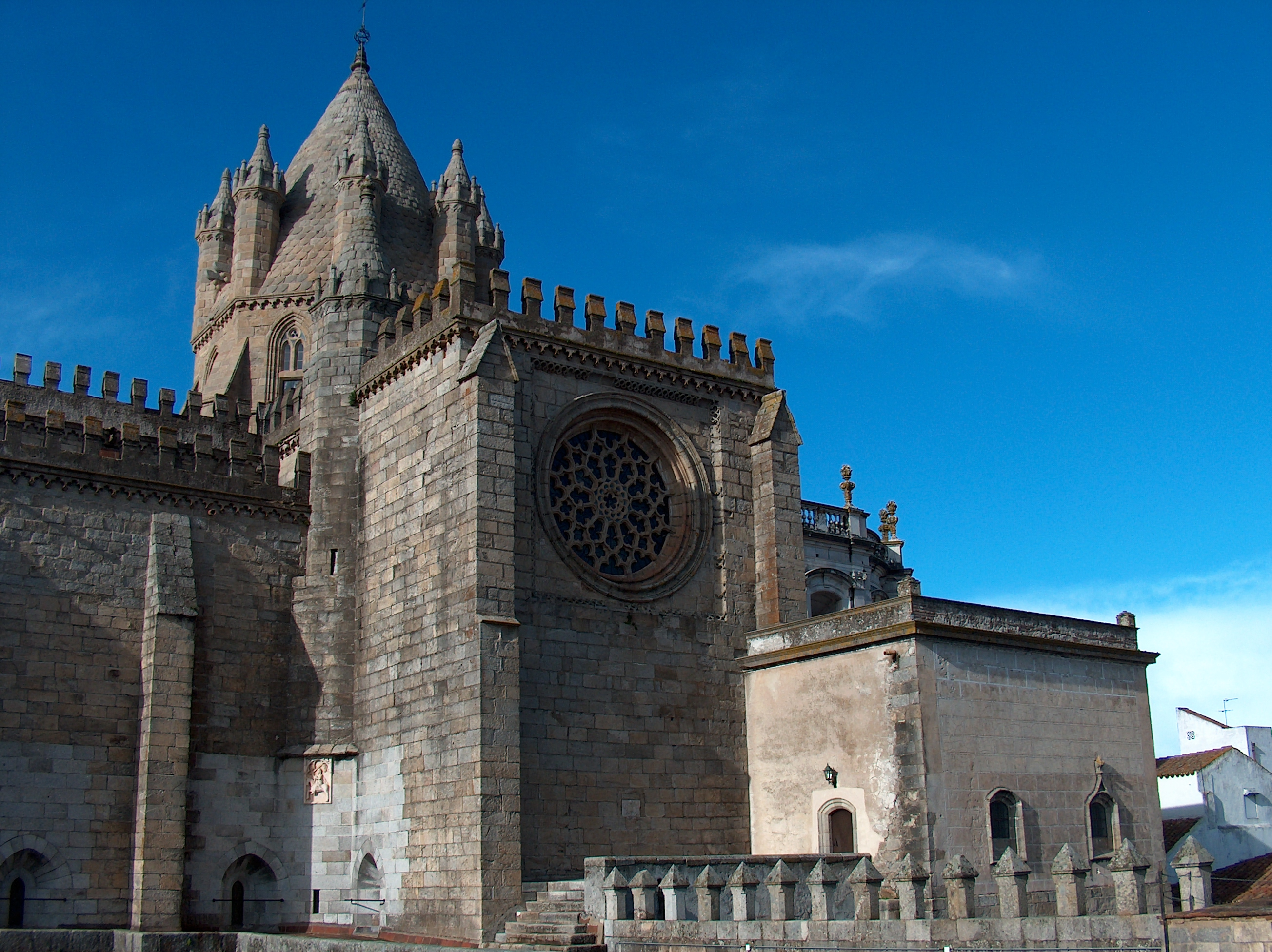 Sé de Évora ou Sé Catedral de Évora